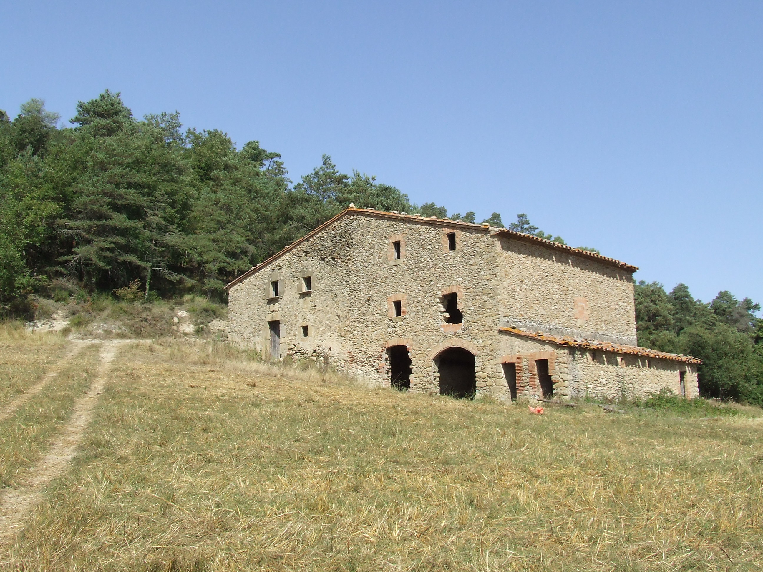 Cal Fantasia (Castellcir, Moianès)